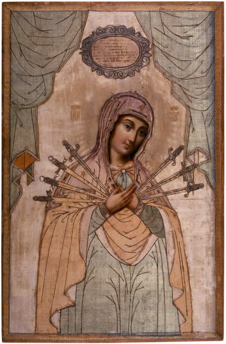 Богоматерь Умягчения злых сердец (Из церкви Распятия в Большом Кремлевском дворце)